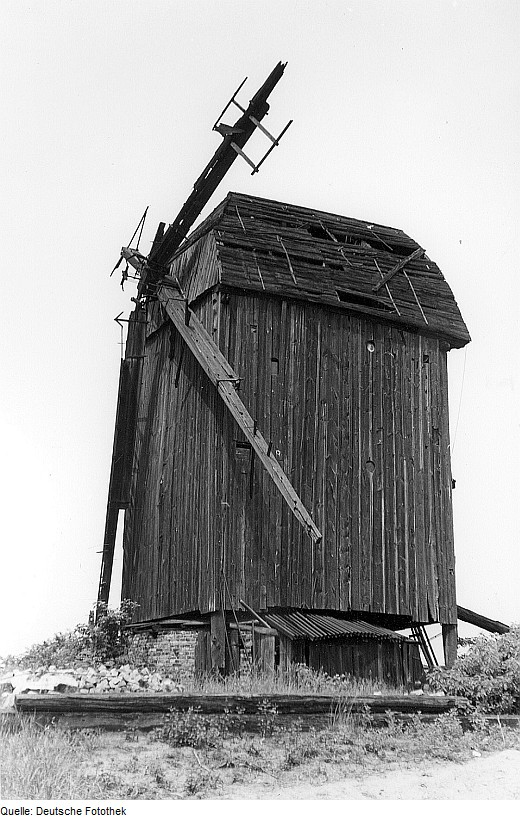 Original image description from the Deutsche Fotothek Potsdam-Drewitz. BockmühleBockwindmühle Potsdam-Drewitz